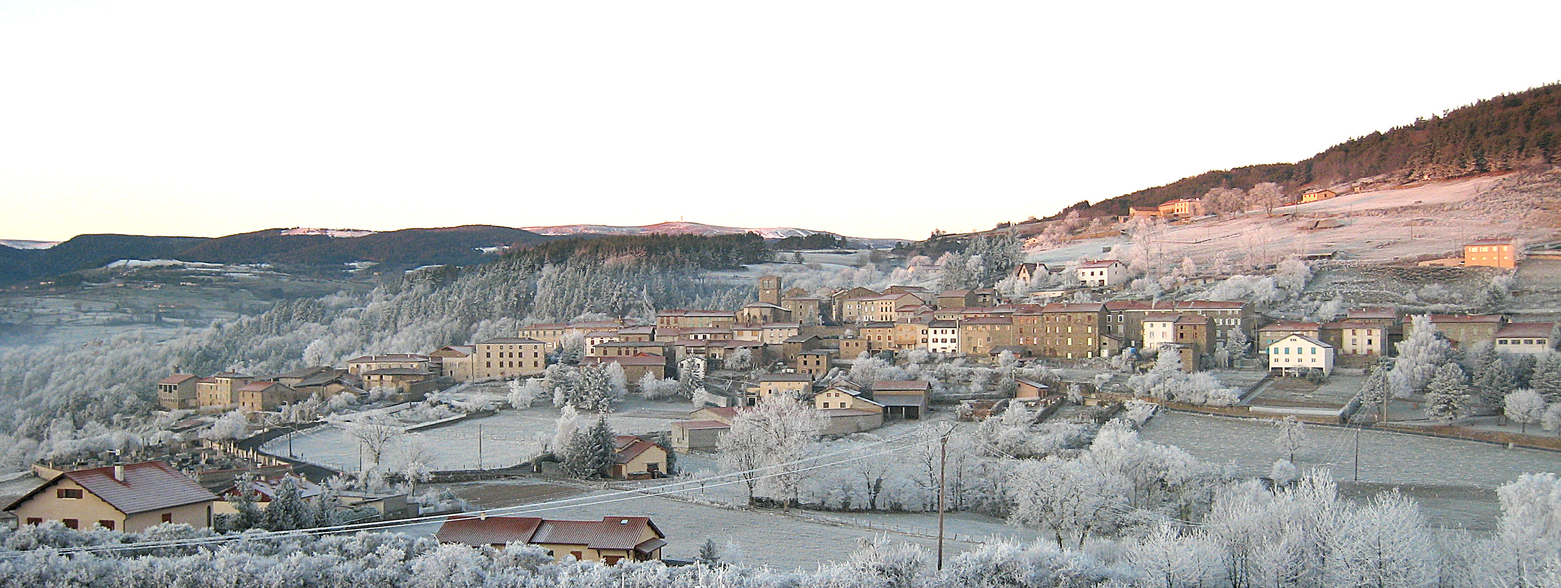 St Georges en Couzan au matin du 26 décembre 2006